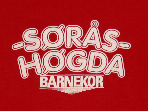 Logo Søråshøgda barnekor